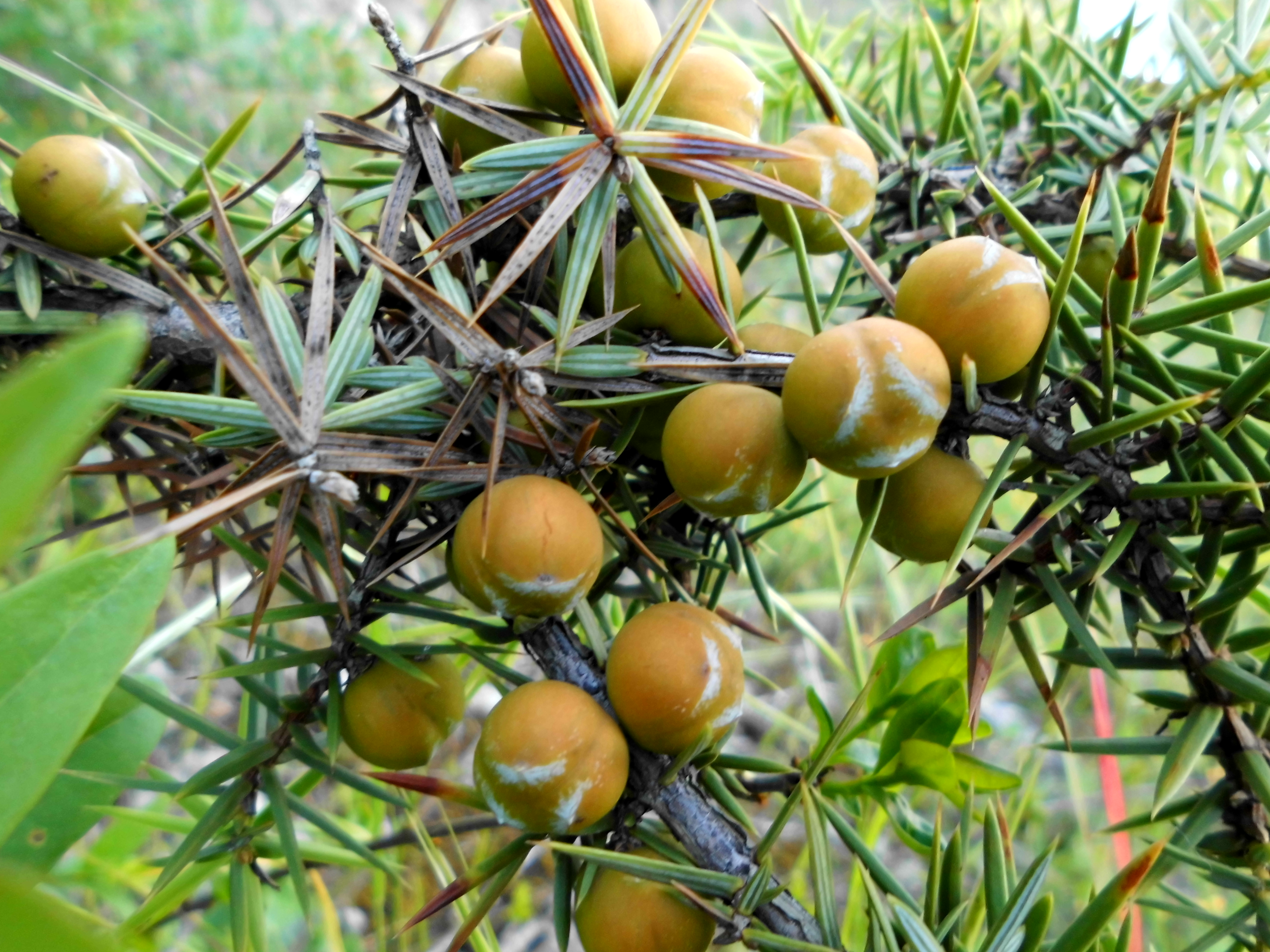 Плодови од смрека, дел од растителниот свет на Водно, Скопје.